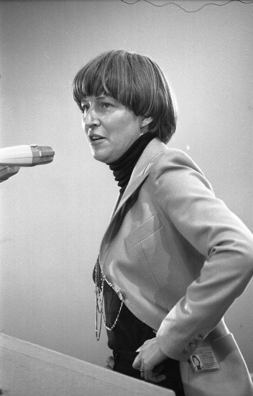 28. Ordentlicher Bundesparteitag der FDP in der Kieler Ostseehalle. (Helga Schuchardt) 6.-8.11.1977